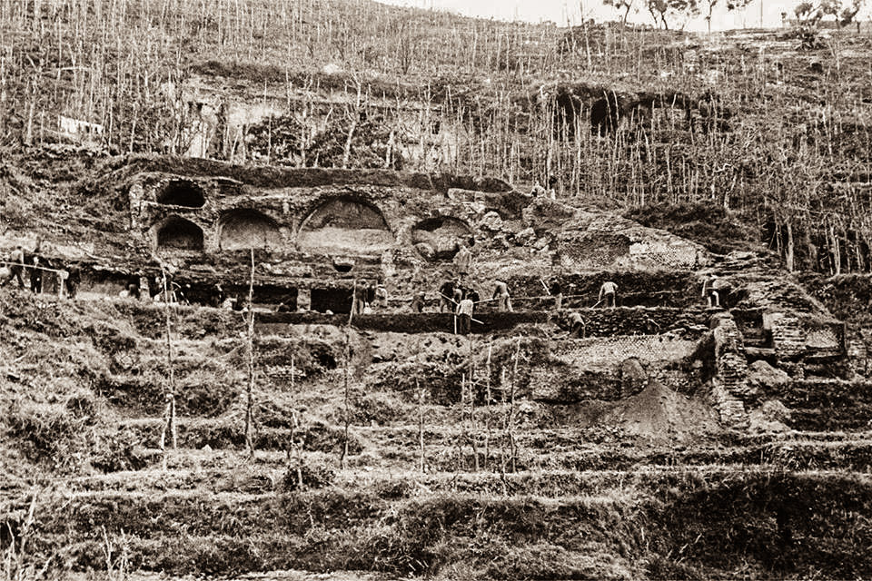 Bacoli - Parco archeologico di Baia : scavo del settore di Sosandra (teatrino) negli anni '50. Autore sconosciuto.